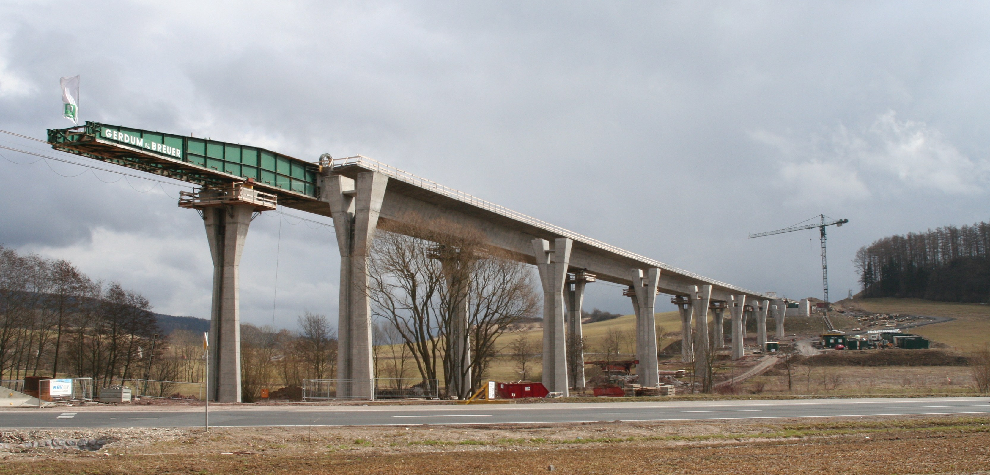 Talbrücke Brünn in Südthüringen Autobahnbrücke (A73)